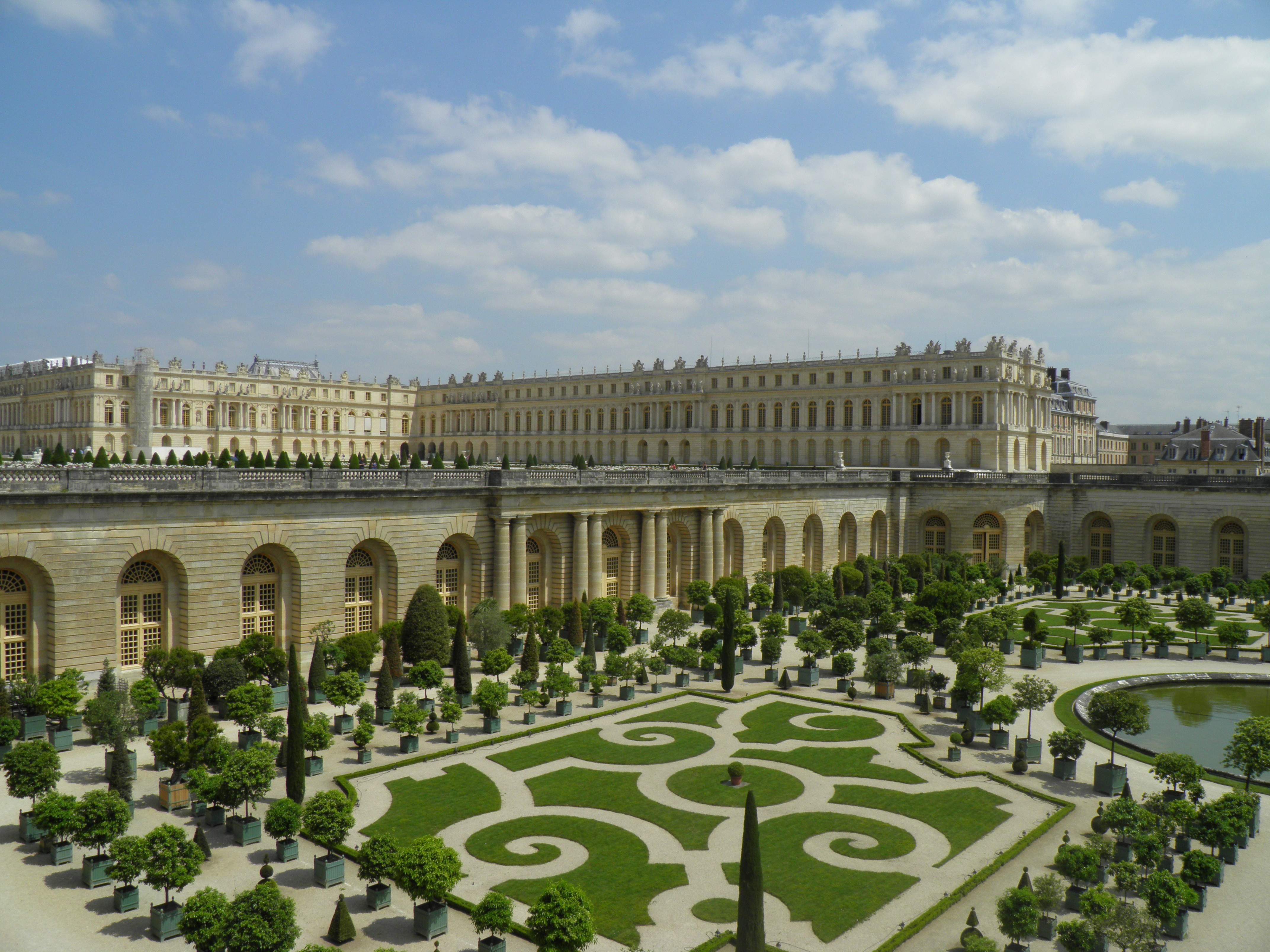 Château de Versailles et orangerie (Yvelines, France).